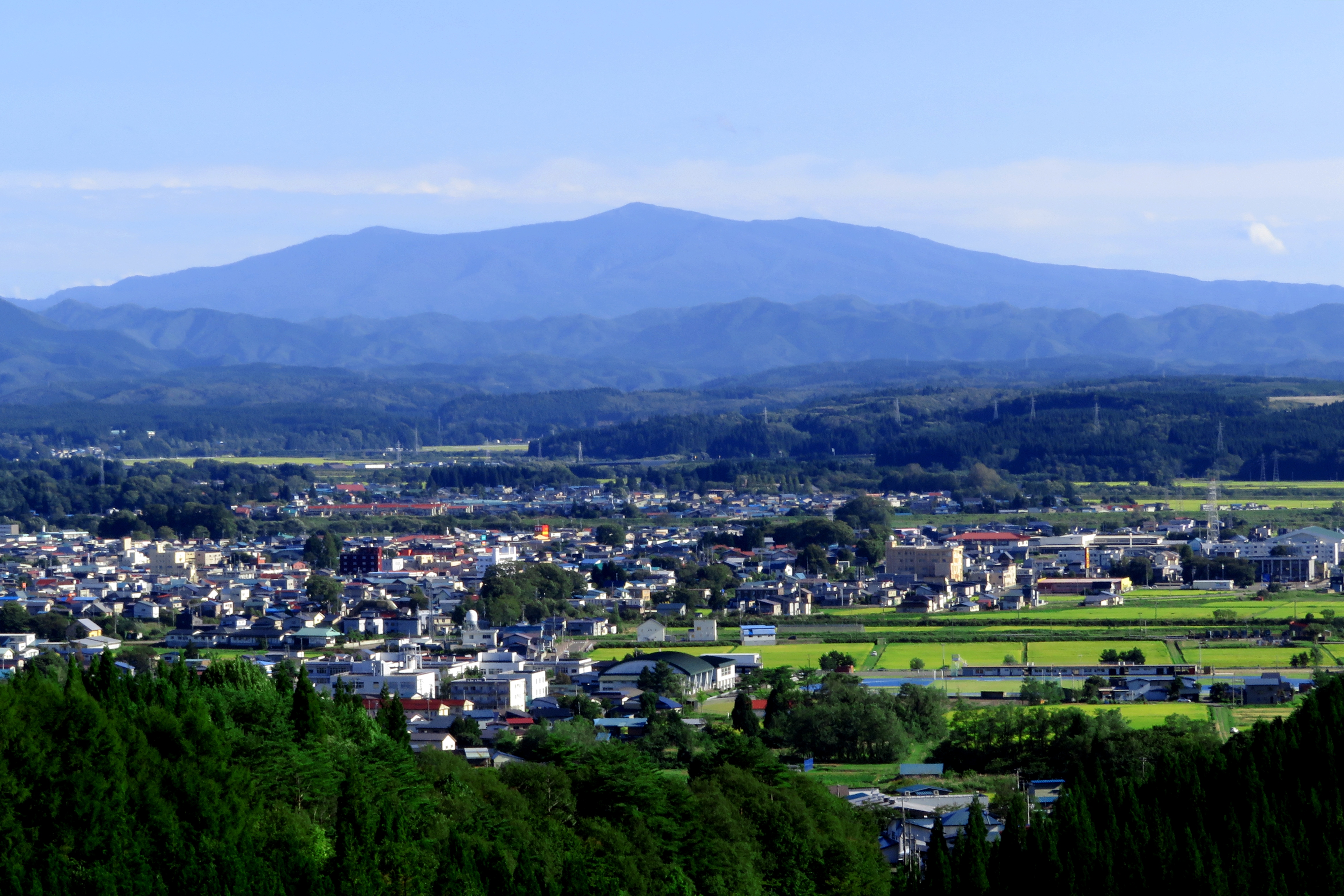 北秋田市坊沢の慶祝森林自然公園から望む鷹巣市街と森吉山 Canon PowerShot SX720 HS